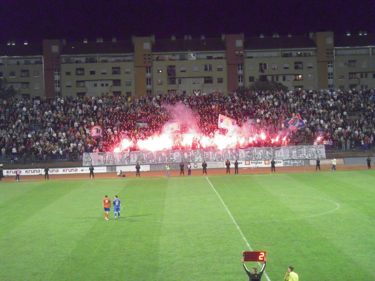 Borac-Željezničar,_2009._godine_Banja_Luka